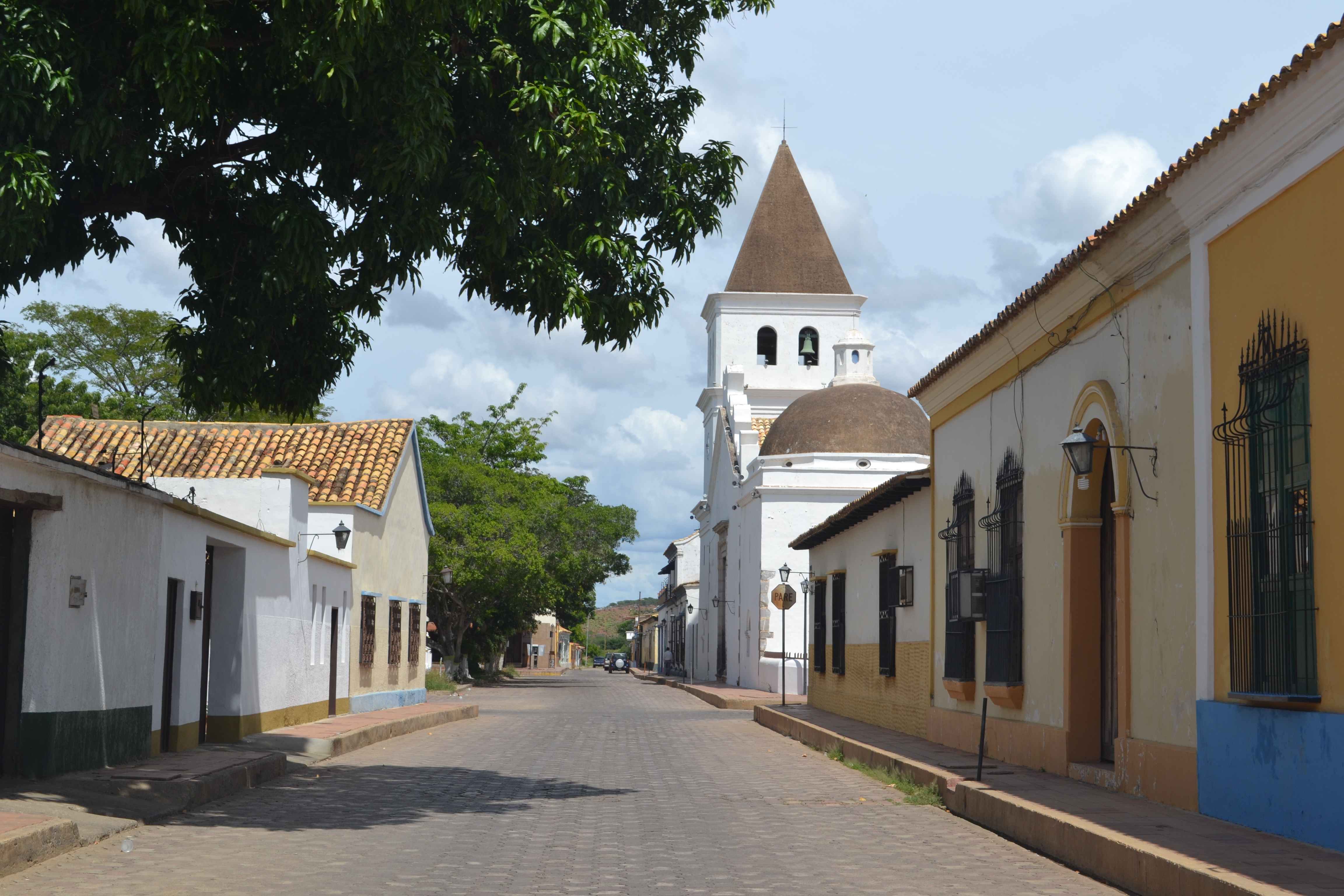 Iglesia matriz de San Juan Bautista de la ciudad de Carora, estado Lara, Venezuela